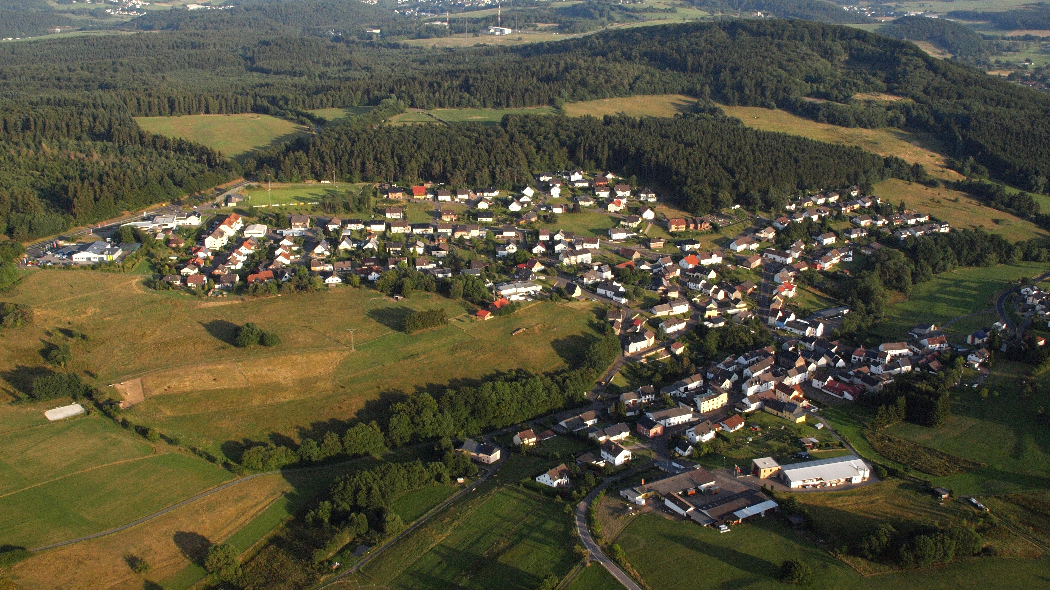 Waldkönigen, Luftaufnahme (2015)